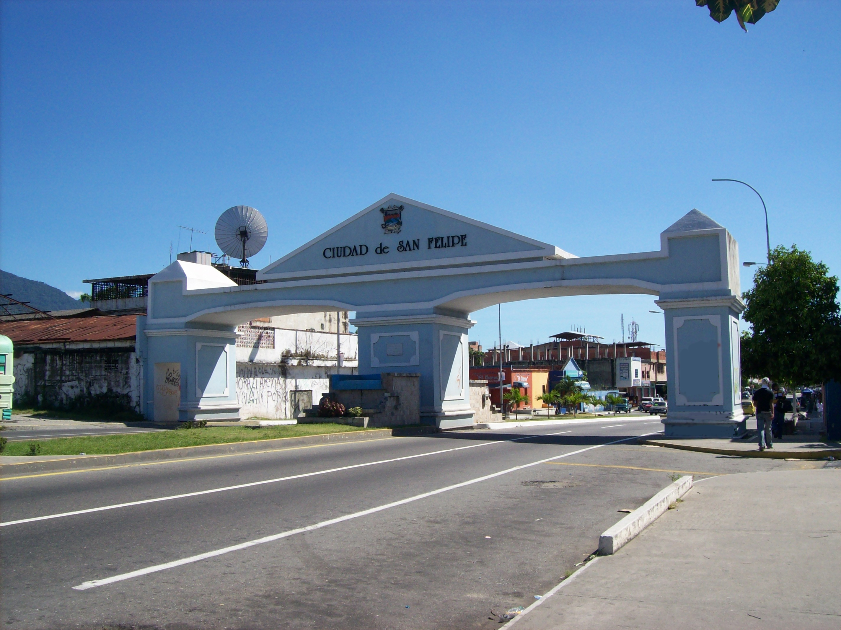 Arco Ciudad de San Felipe, el cual se encuentra ubicado en los límites municipales Sn Felipe - Independencia. San Felipe. estado Yaracuy. Venezuela